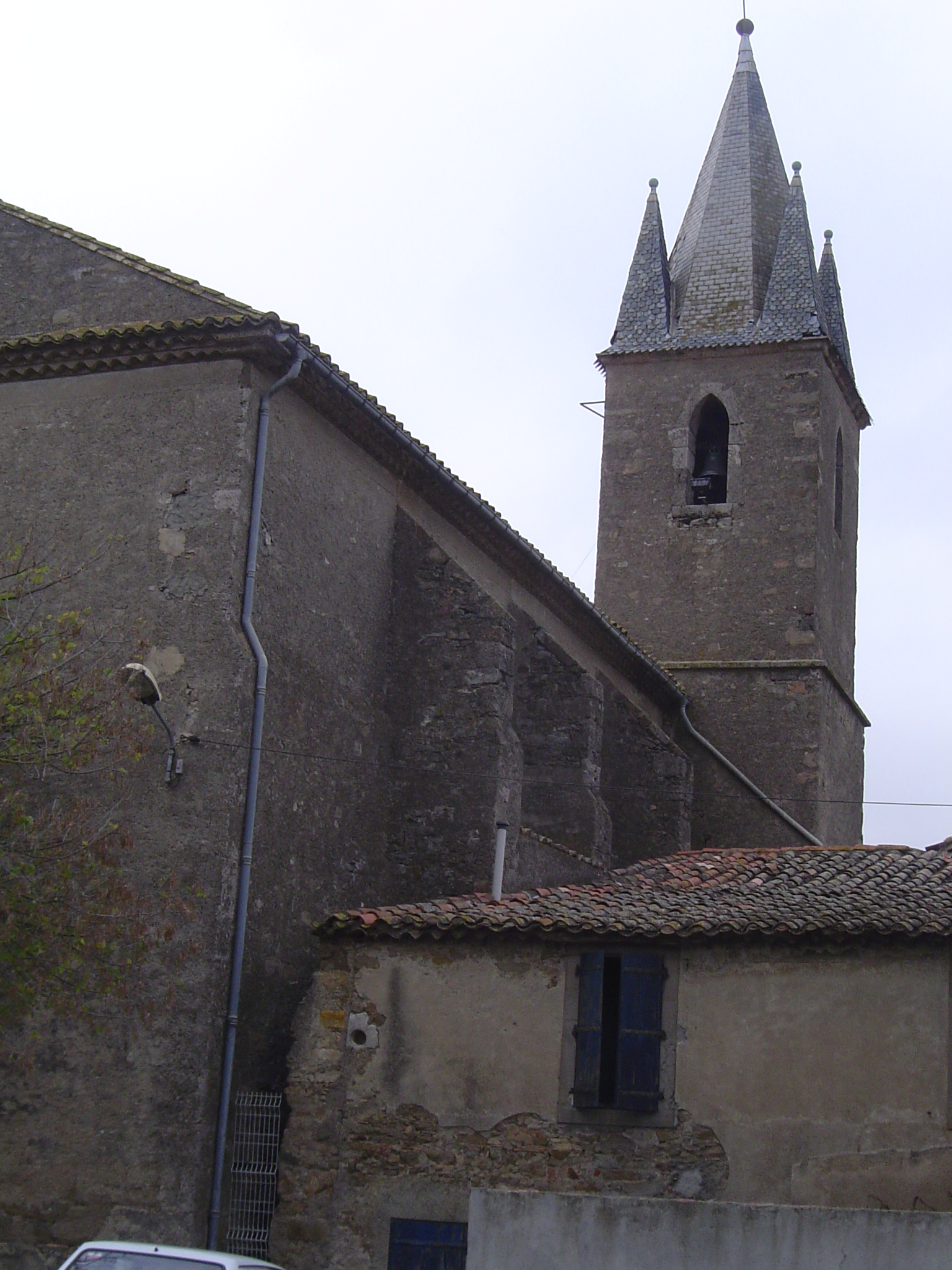 Detall del campanar de l'esglèsia de Conilhac